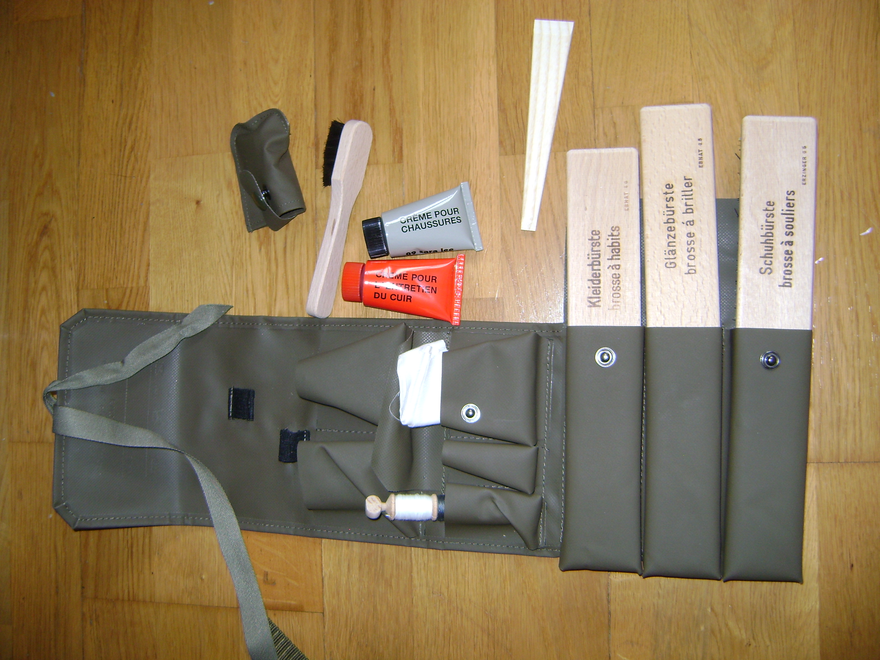 Putzzeug inhalt